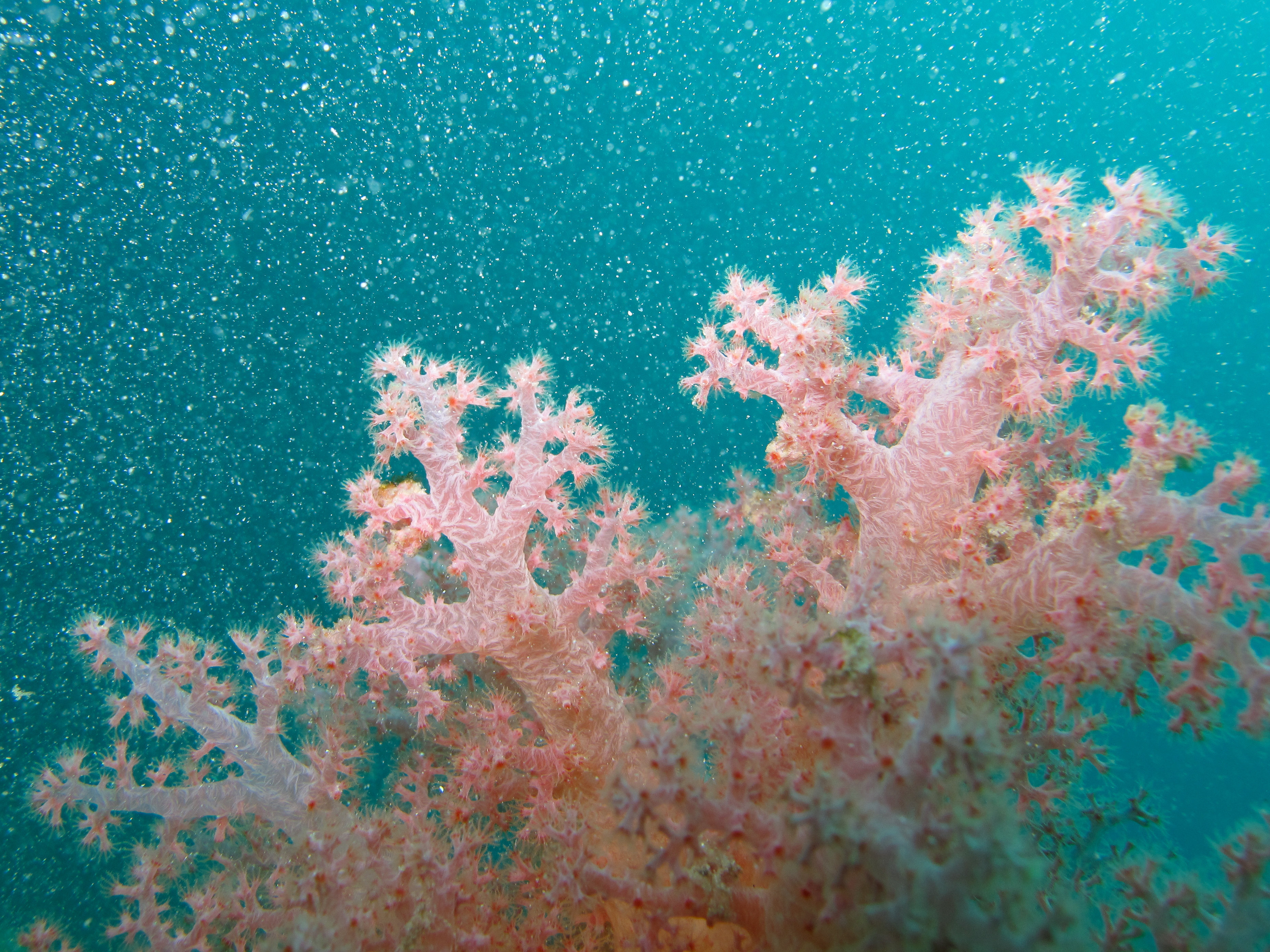 Ko Lanta, November 2010